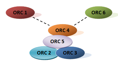 Esquema de com s'uneixen les diferents proteïnes que formen el complex de reconeixement d'origen.